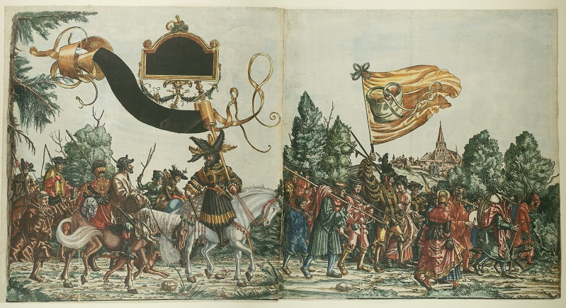 Ein Teil aus der Holzschnittserie "Triumphzug Kaiser Maximilians I."